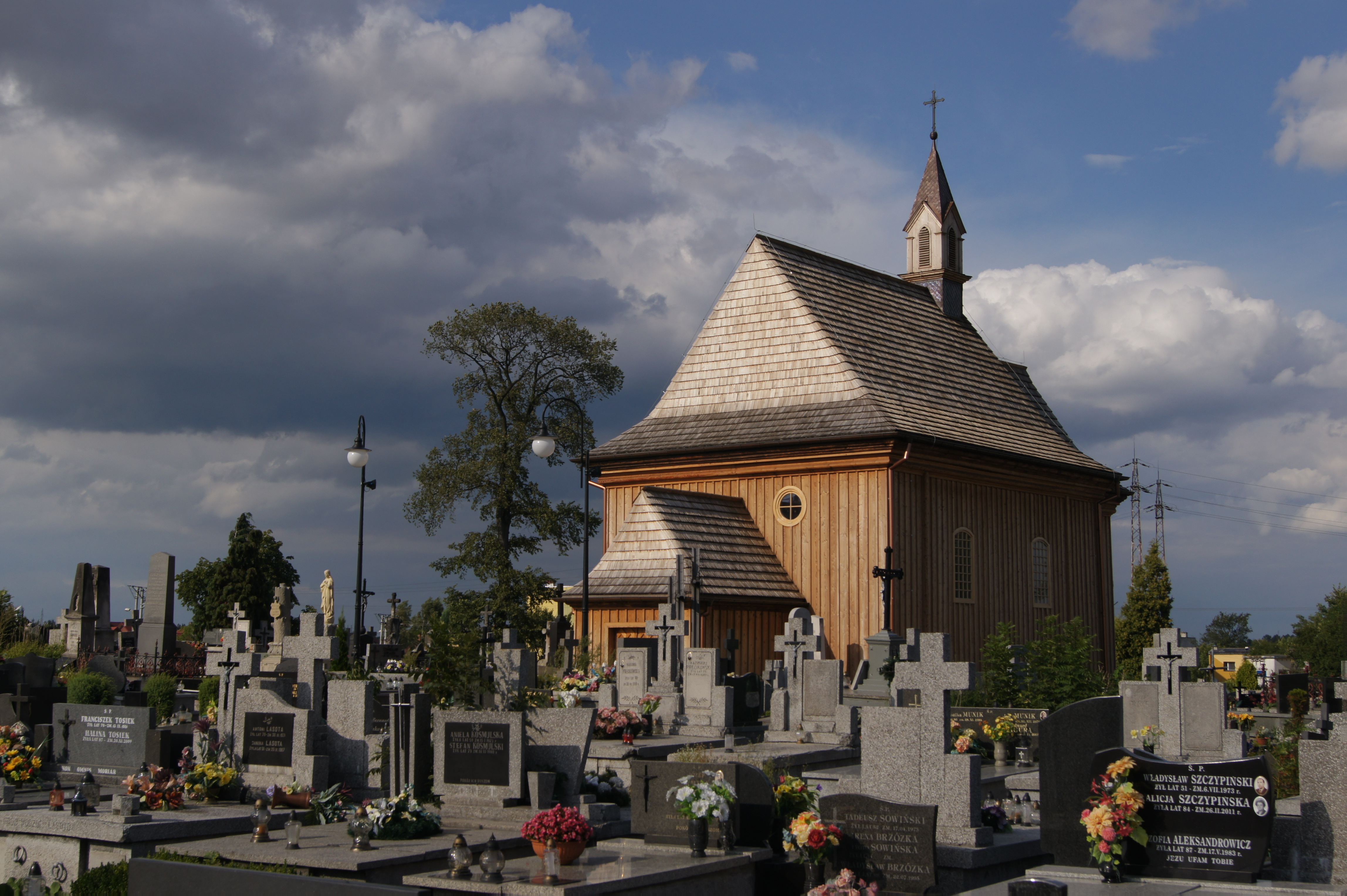 Opoczno, kościół cmentarny p.w. św. Marii Magdaleny, XVIII, 1919, 1926